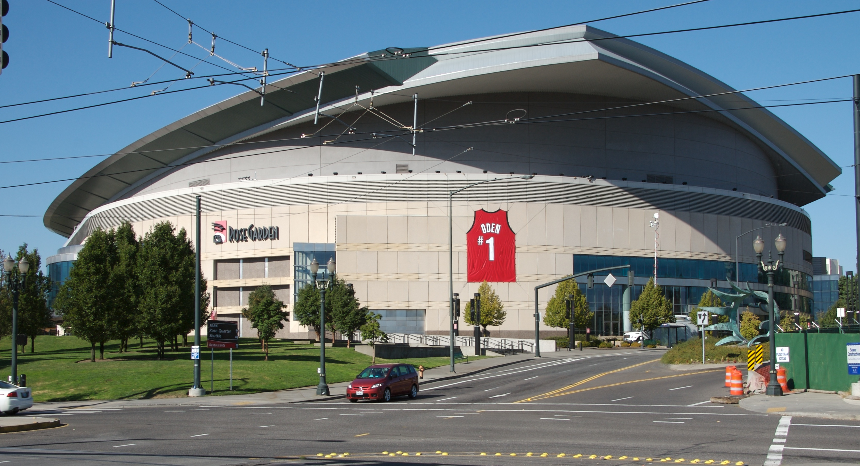 Wikipedia: Rose Garden Arena